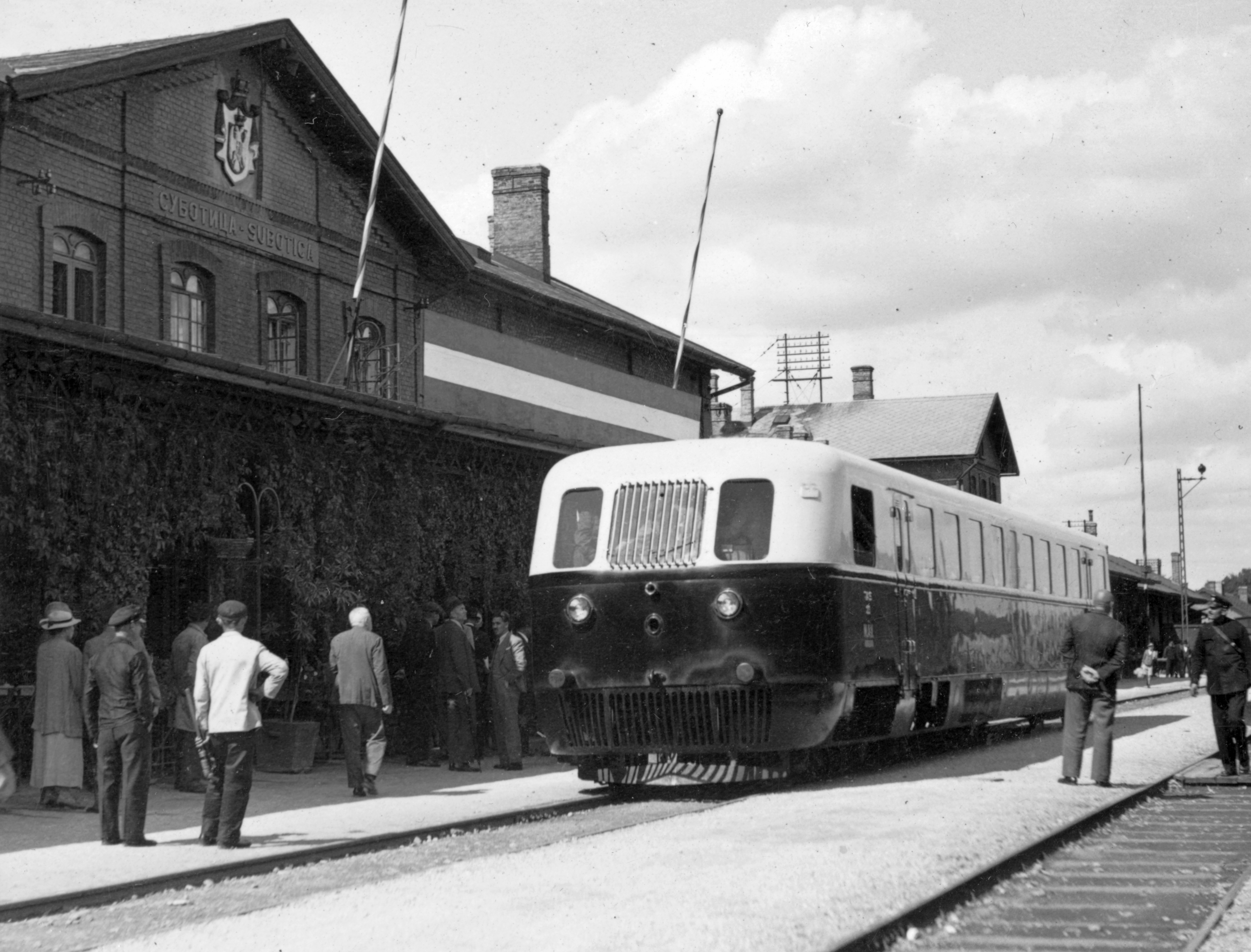 vasútállomás, Ganz gyártmányú Árpád sorozatú (TAS) sínautóbusz. Location: Serbia, Subotica Tags: rail, railway, Hungarian brand, Ganz-brand Title: vasútállomás, Ganz gyártmányú Árpád sorozatú (TAS) sínautóbusz.